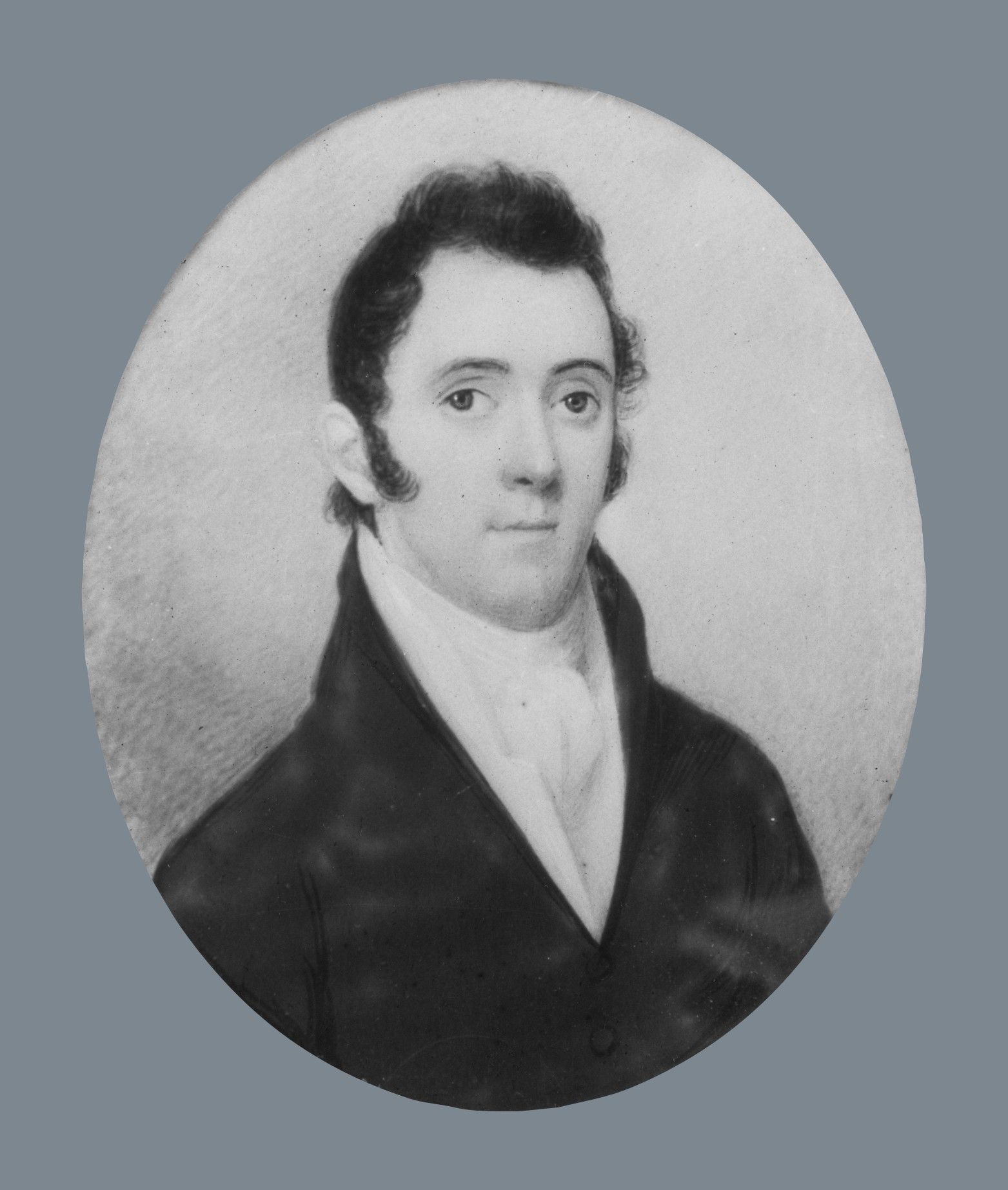 Painting, miniature; Paintings